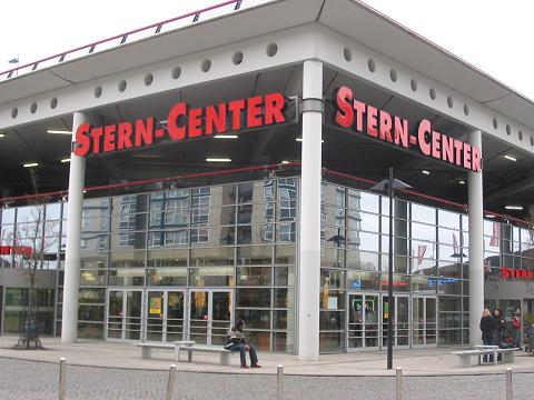 Stern Center in Potsdam-Drewitz